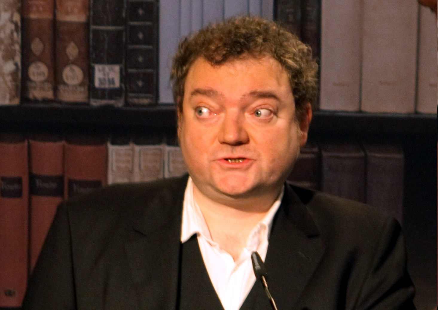 Wiglaf Droste auf dem WDR5-Literaturmarathon während der lit.Cologne 2008